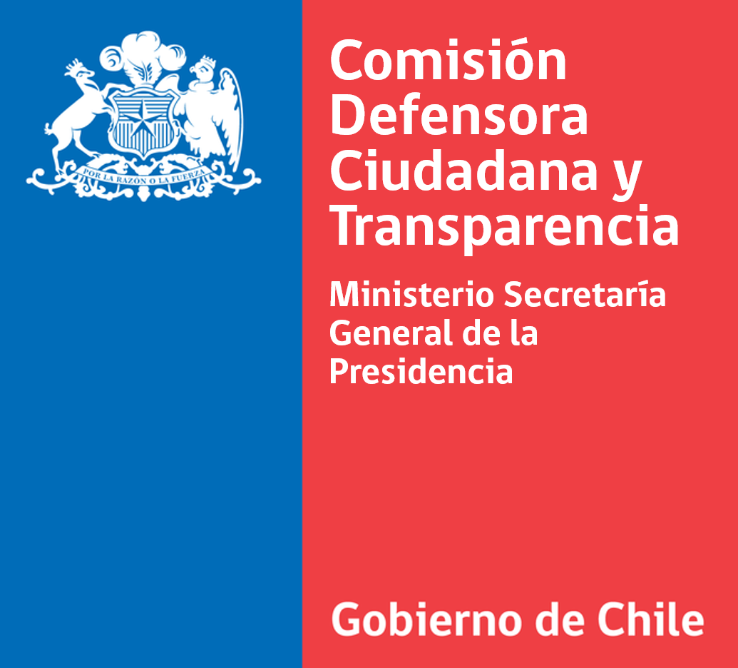 Logo institucional de la Comisión Defensora Ciudadana y Transparencia.